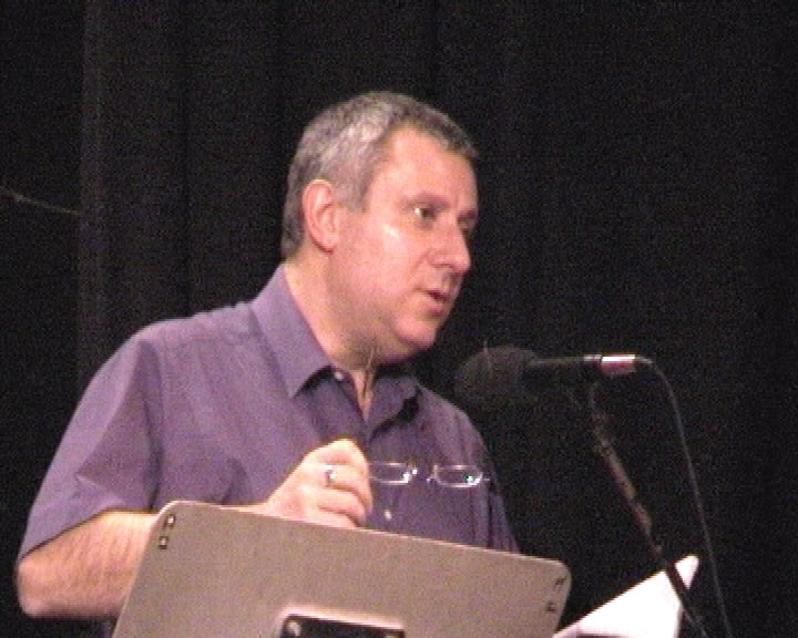 Daniel Gluckstein lors d'un meeting à Lyon (France)